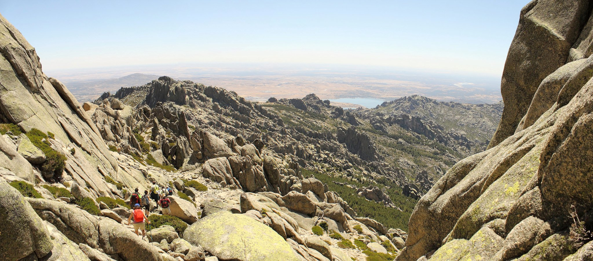 La Pedriza- Madrid ,bajada desde las cuatro torres